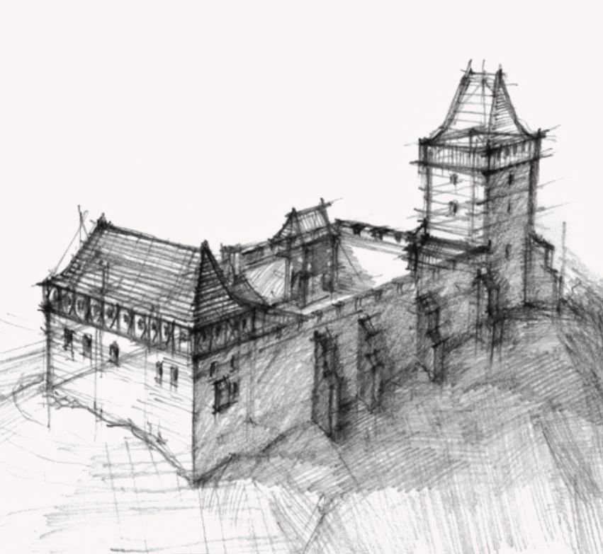 Rekonstrukcja wyglądu zamku w Muszynie w okresie średniowiecza, której autorem jest Jerzy Serafin. Rysunek wykonano w 2017 roku i został on opublikowany w darmowym wydawnictwie Gminy Muszyna dostępnej w wersji elektronicznej pod linkiem